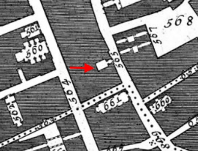 Pianta di Nolli